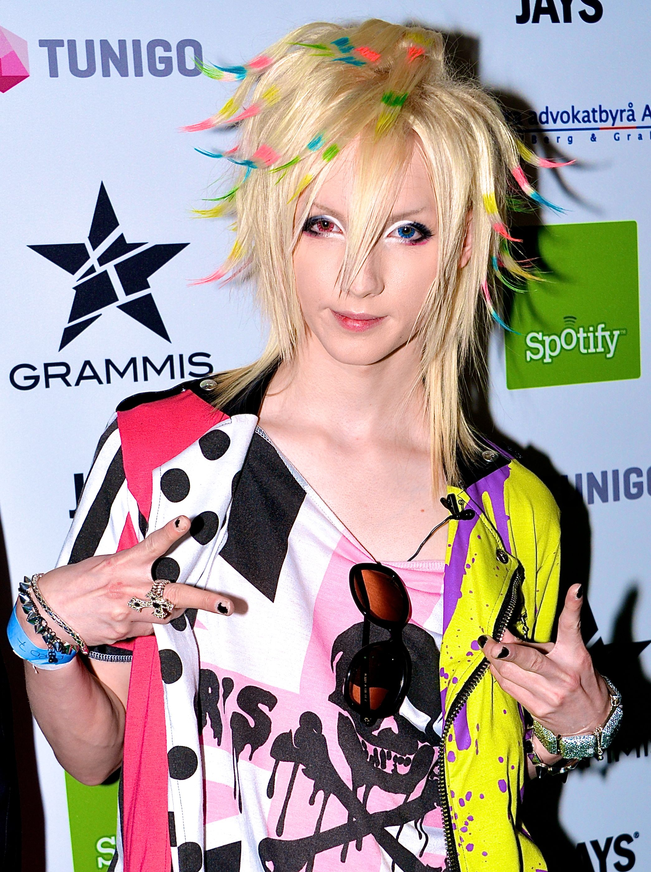 Yohio på Grammisgalan på Cirkus i Stockholm den 20 februari 2013.